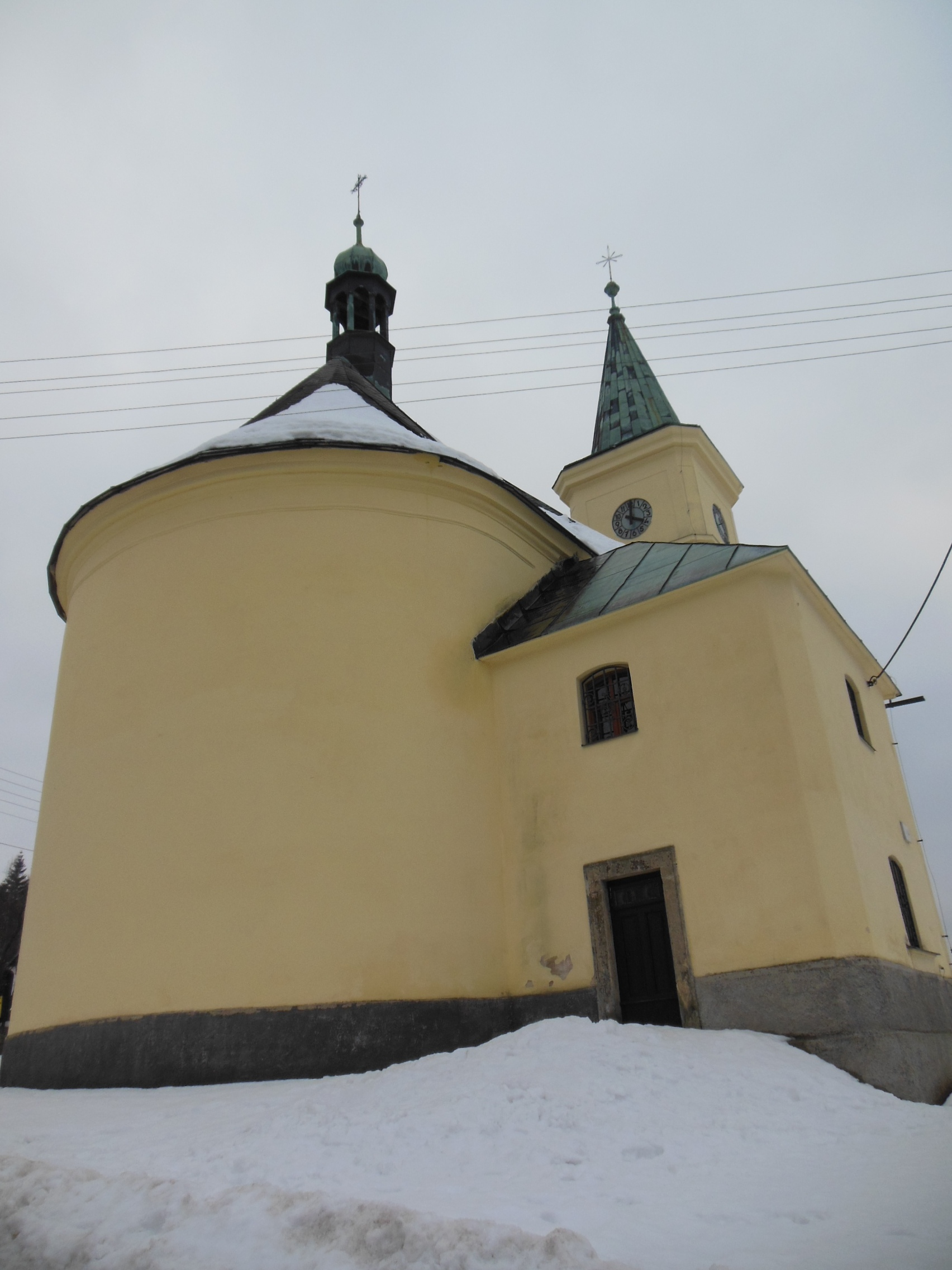 Barokní kostel sv. Františka z Pauly z let 1779-1784.